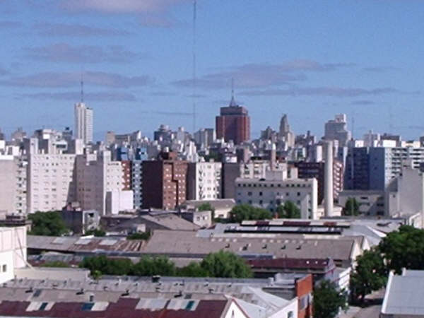 La Torre del Gaucho (izquierda) y el Palacio Municipal (al centro) sobresaliendo entre los edificios del centro montevideano. por Federico Corral aka Shant, primavera del 2005